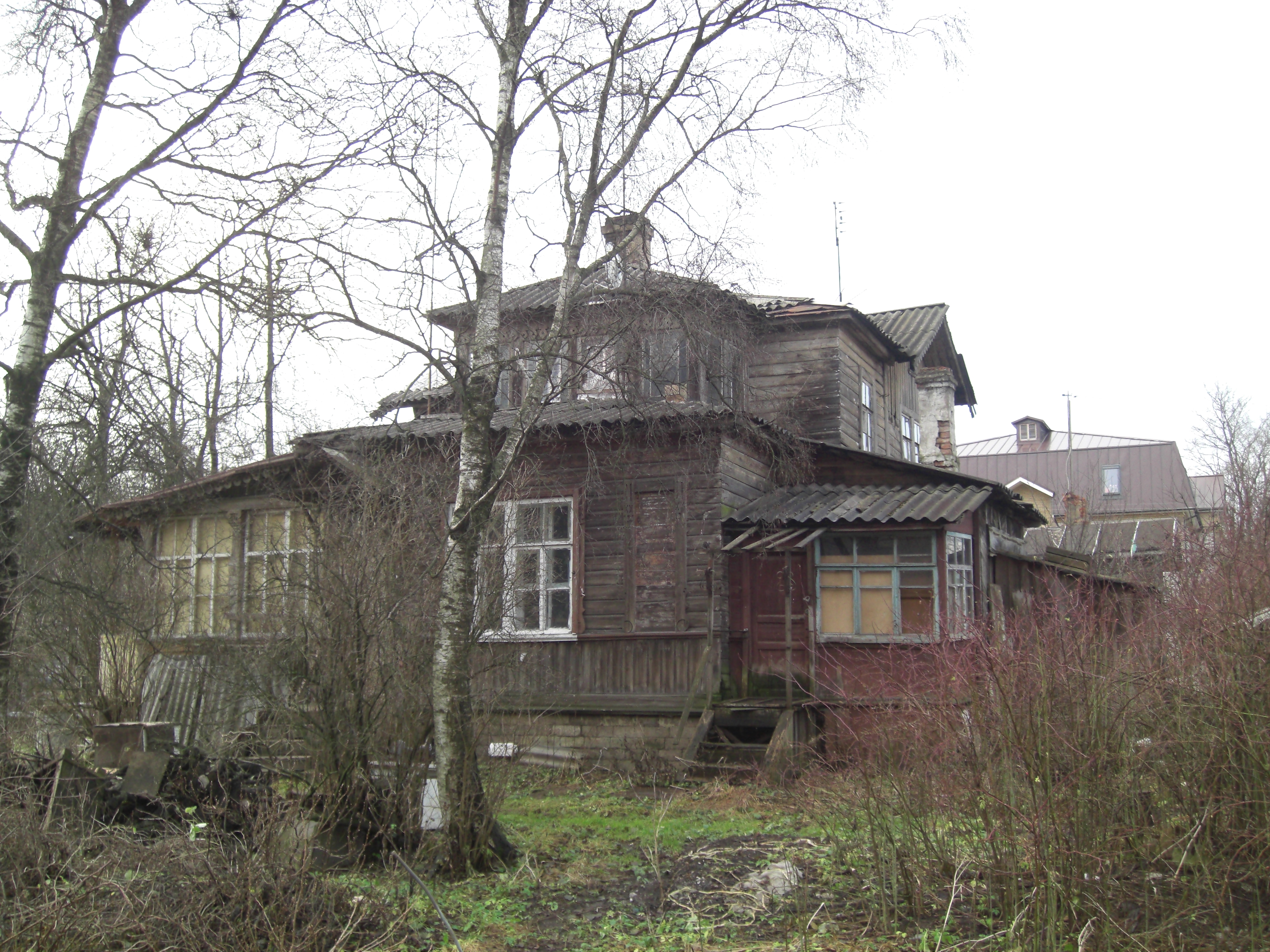 Усадьба Клодницких в Гатчине. Построена в 1870-х годах